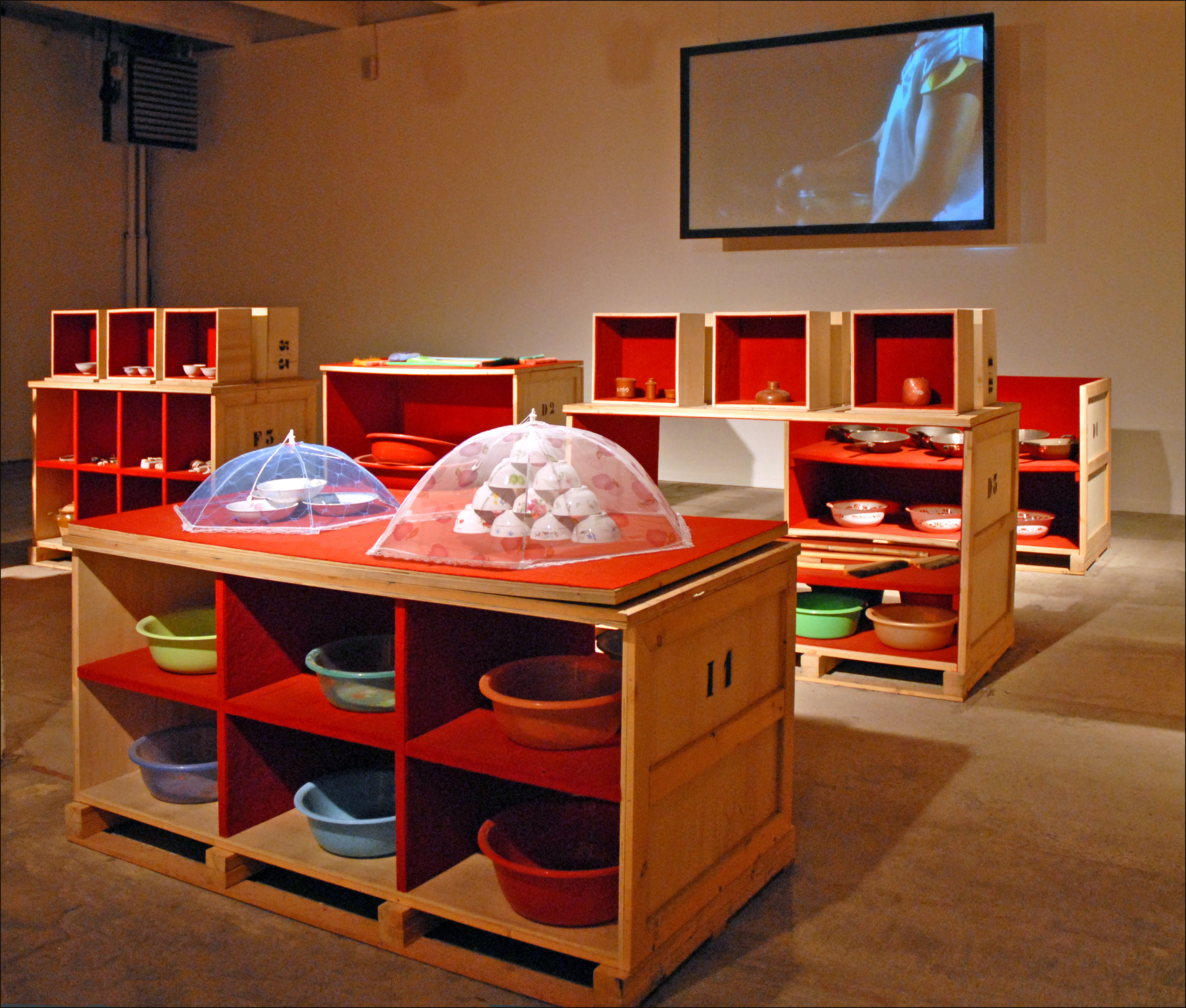 What a Difference a Day Made 2008 Oeuvre de Michael Lin (1964, Tokyo) (Quincaillerie de Shanghaï / classement des objets par catégorie) La Sucrière Xe Biennale de Lyon "Le spectacle du quotidien" Commissaire : Hou Hanru